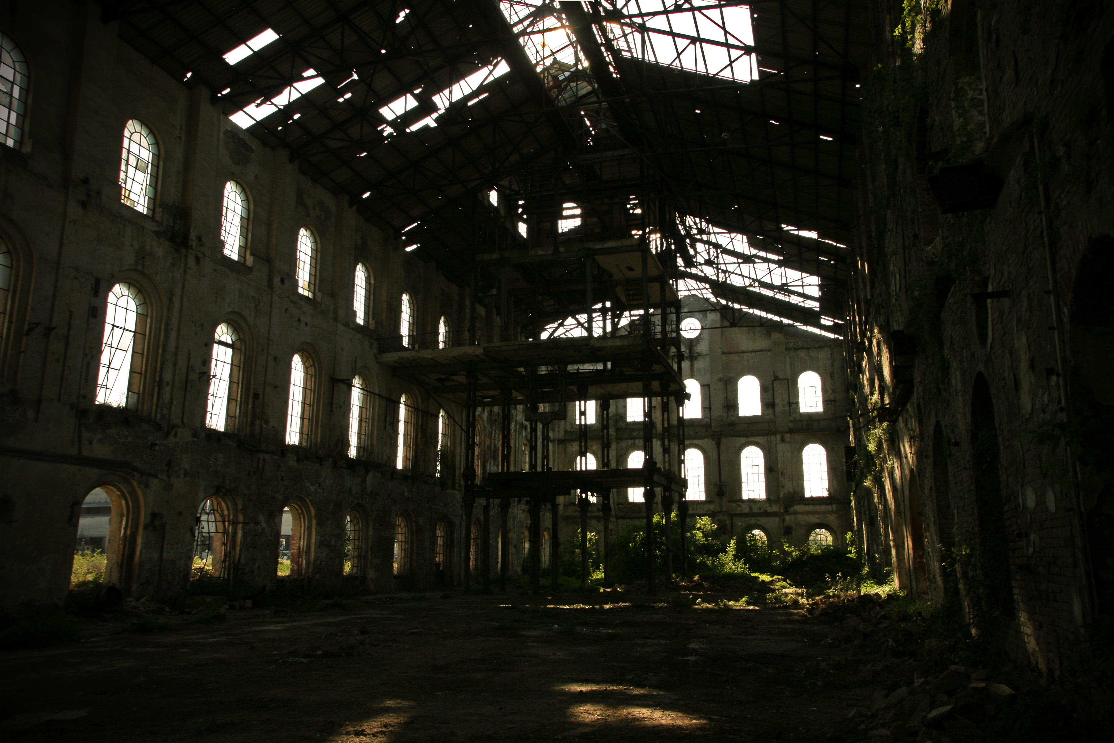 Codigoro, l'ex zuccherificio oramai in rovina.